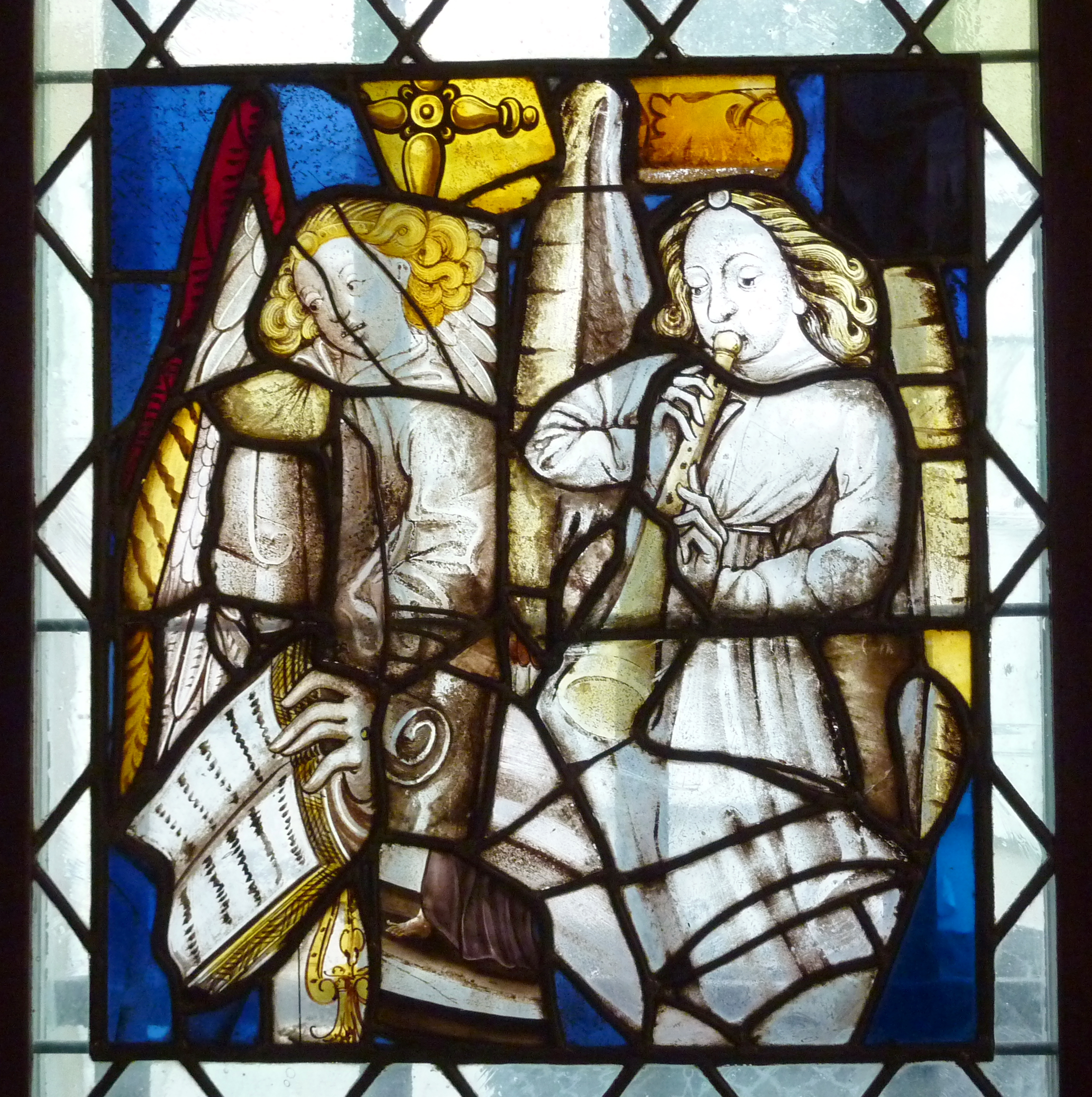 Fragment einer Bleiglasscheibe im Museum Carnavalet in Paris (15./16. Jahrhundert), Darstellung: Engel